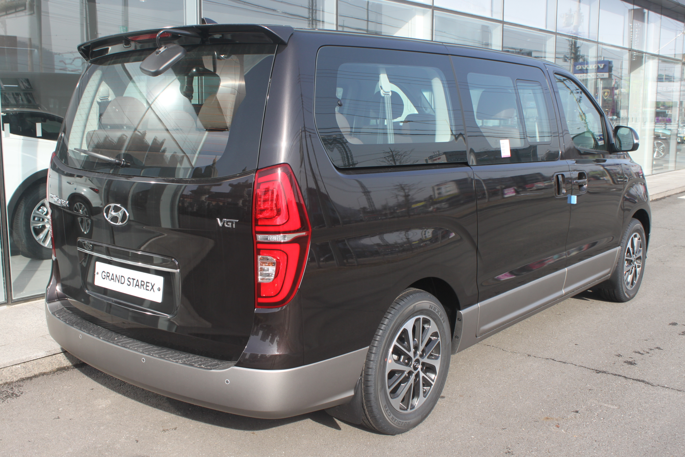 현대 더 뉴 그랜드 스타렉스 후측면(9인승 어반)